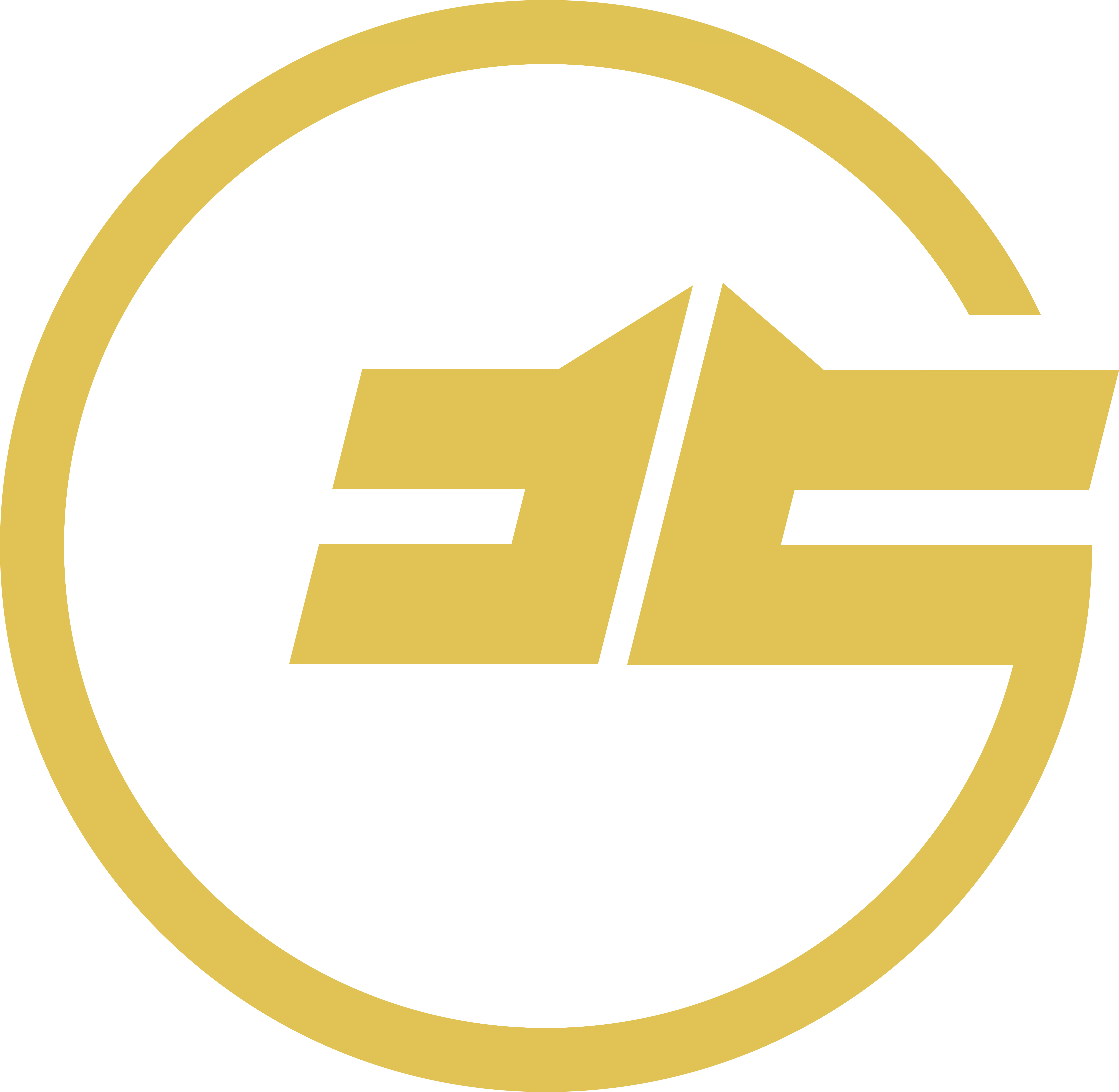 北条鉄道社章